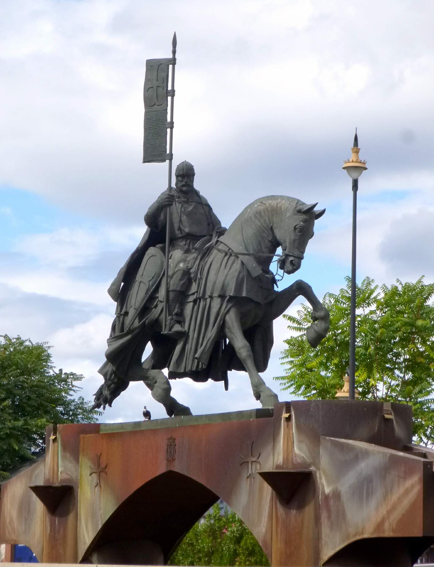 Ponferrada - Glorieta del Caballero Templario